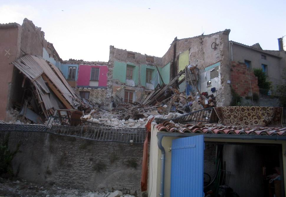 Maisons effondrées à Bellegarde-du-Razès.